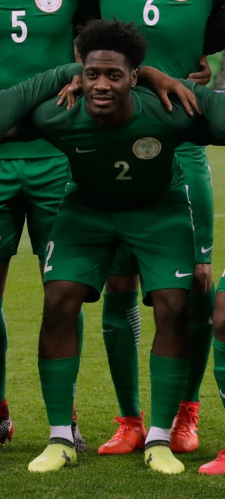 Nigeria national football team